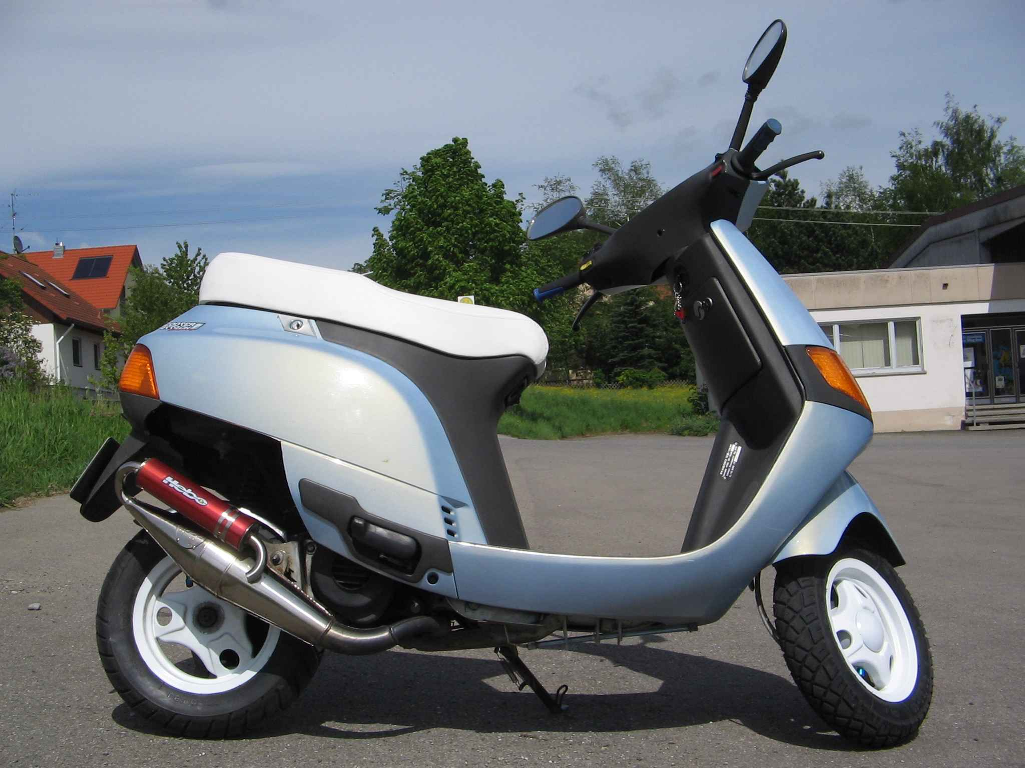 Sfera1 NSL 80, Baujahr 1992 Das Bild wurde von mir selber aufgenommen und ist somit gemeinfrei!